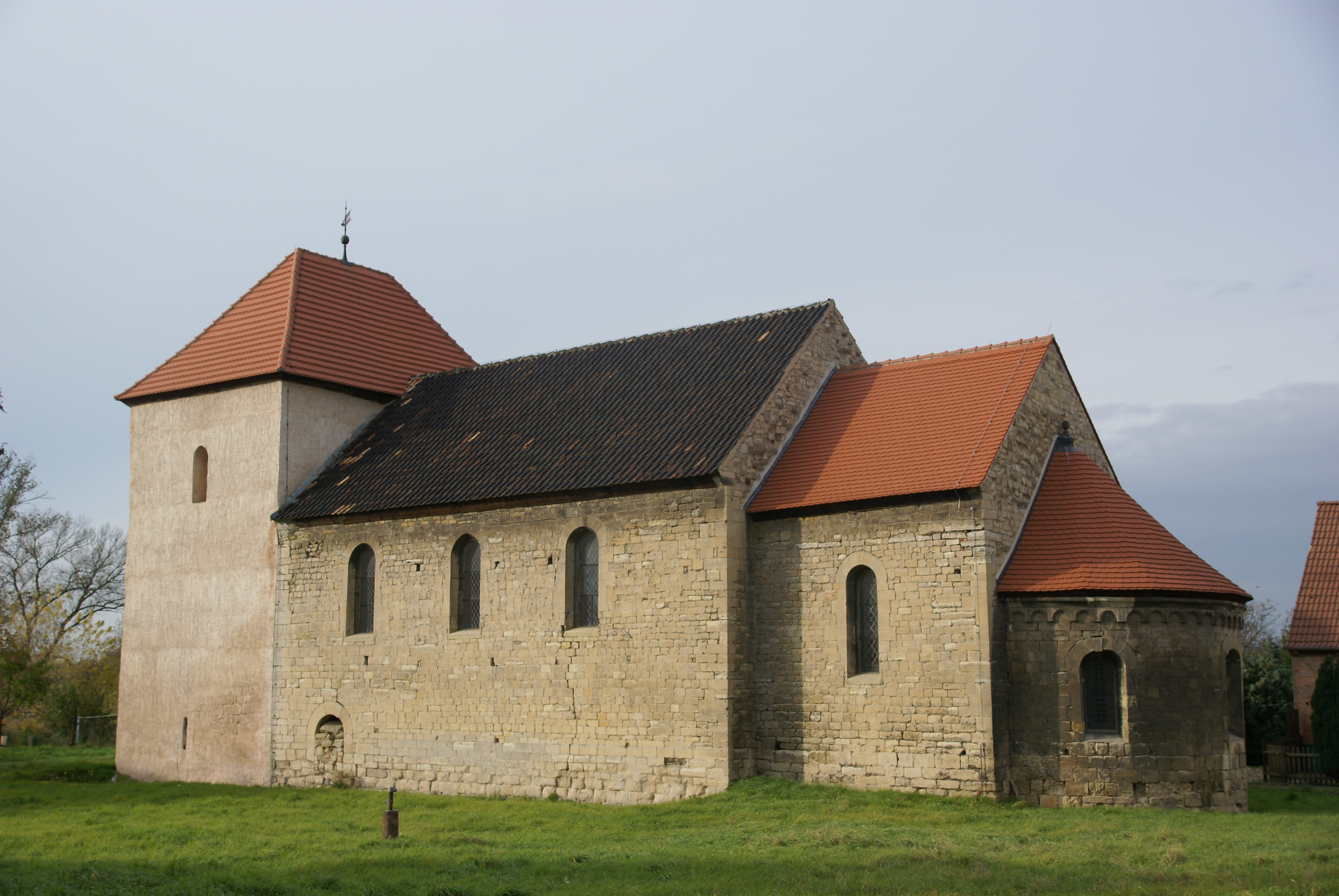 Kirche St. Nikolai in Röblingen am See